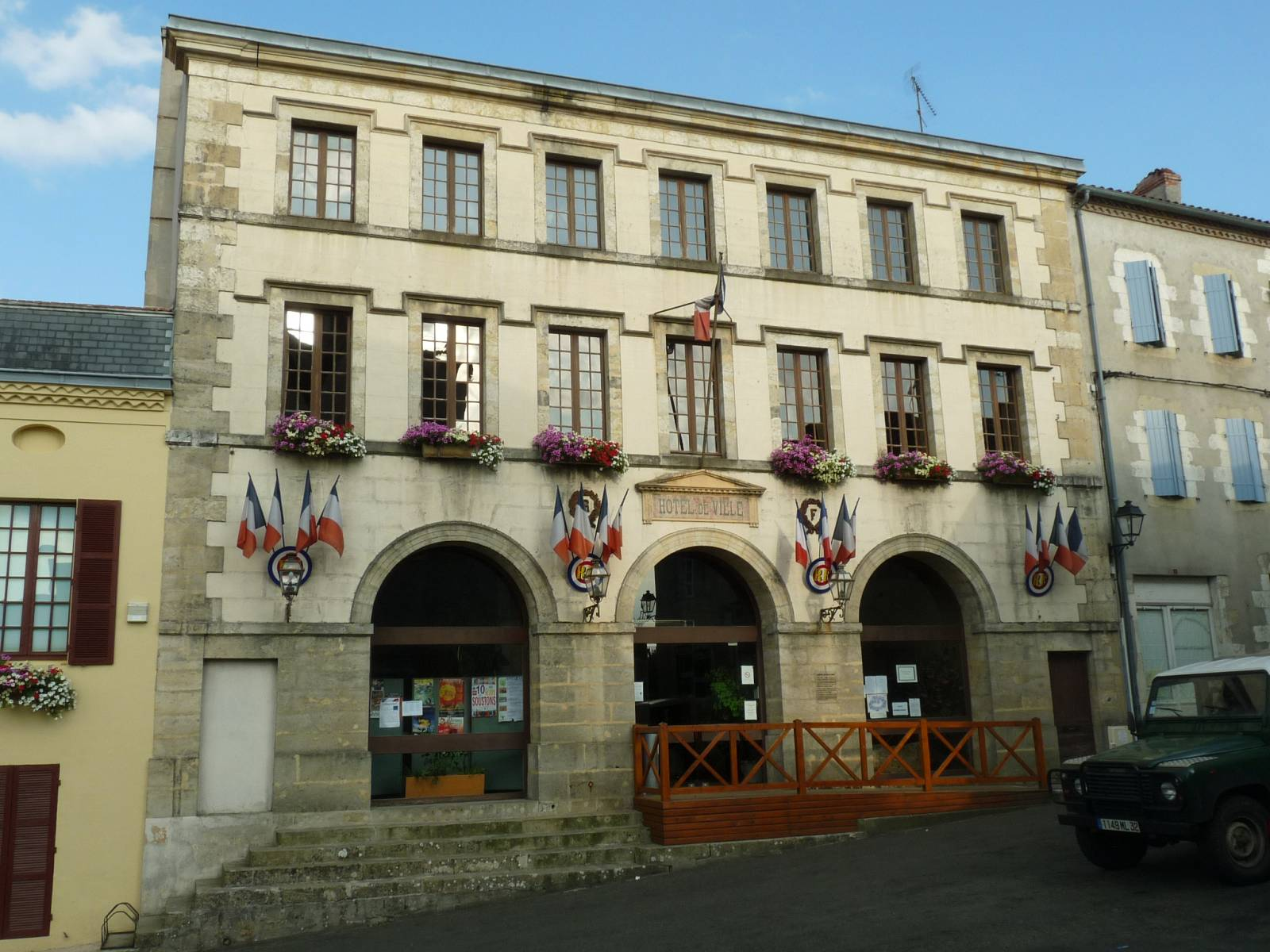 mairie de Roquefort (Landes, France)